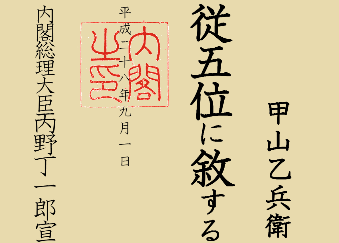 従五位の位記の様式